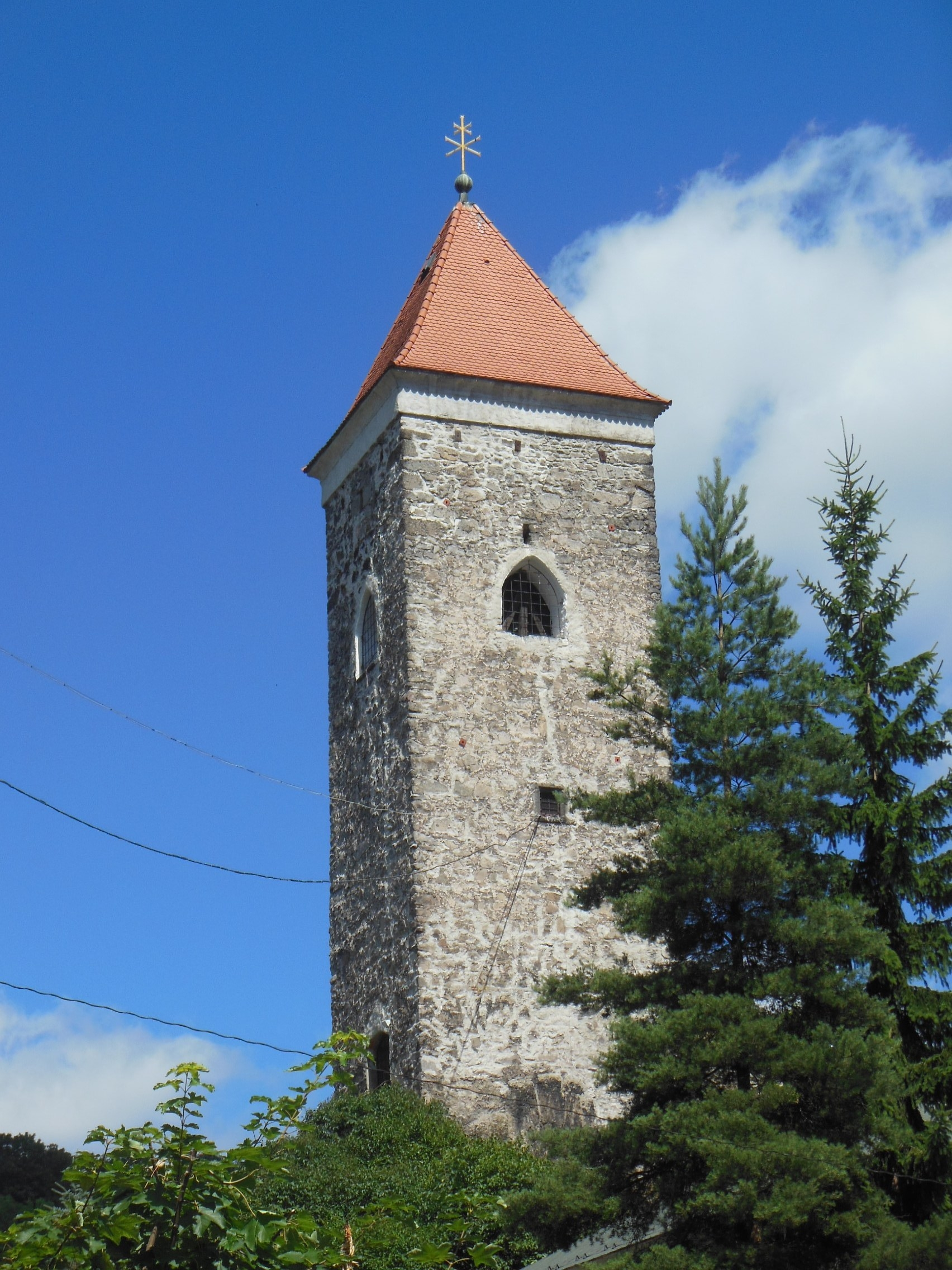 Černá věž v Nejdku (okres Karlovy Vary). Pohled z náměstí Karla IV.